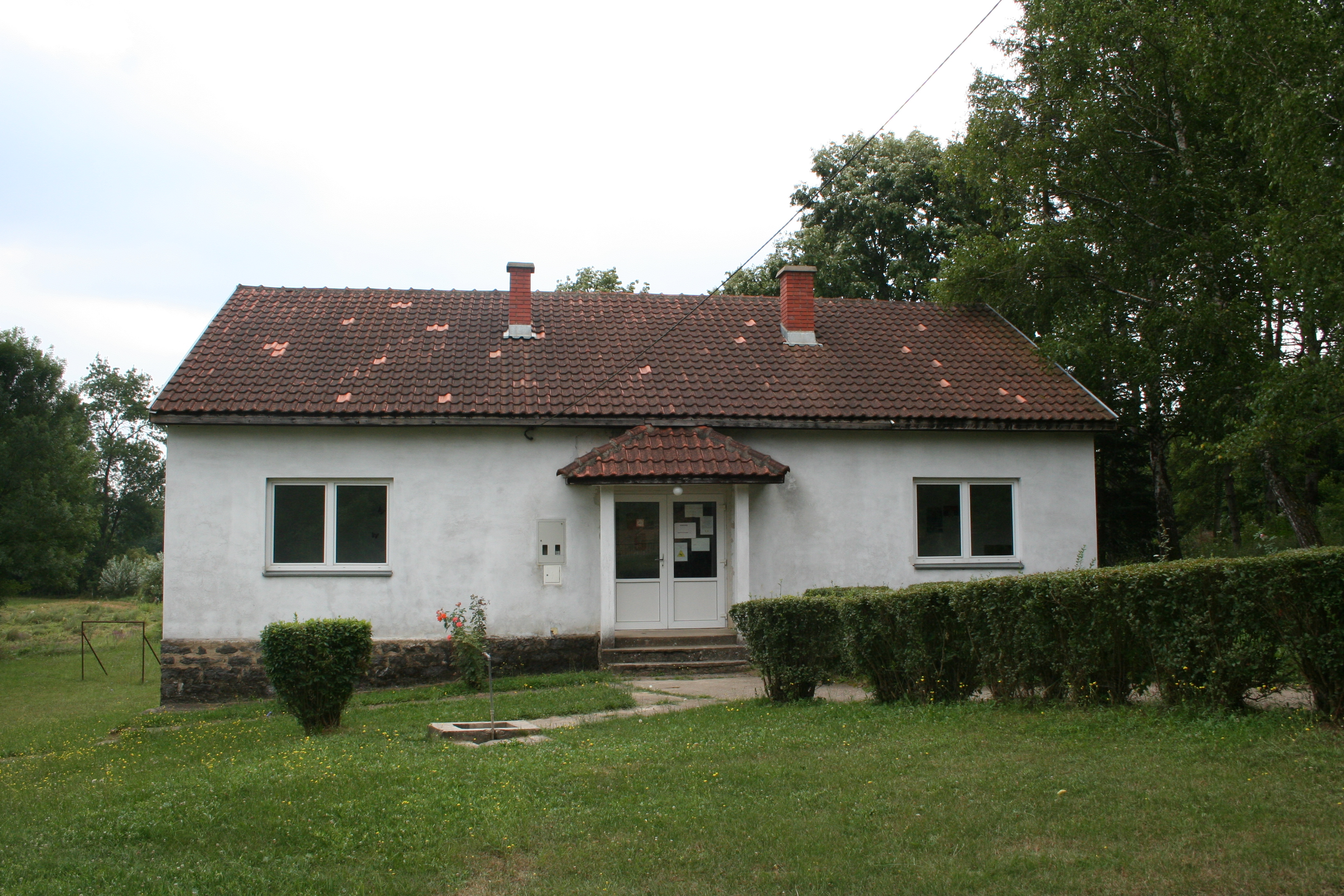 Seoska škola, Goločelo